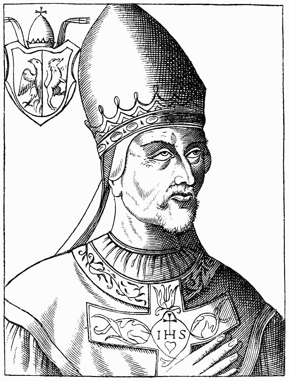 Grégoire VII